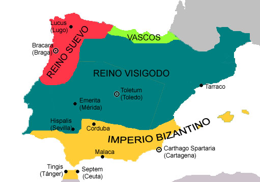 Hispania en el s.VI dc.